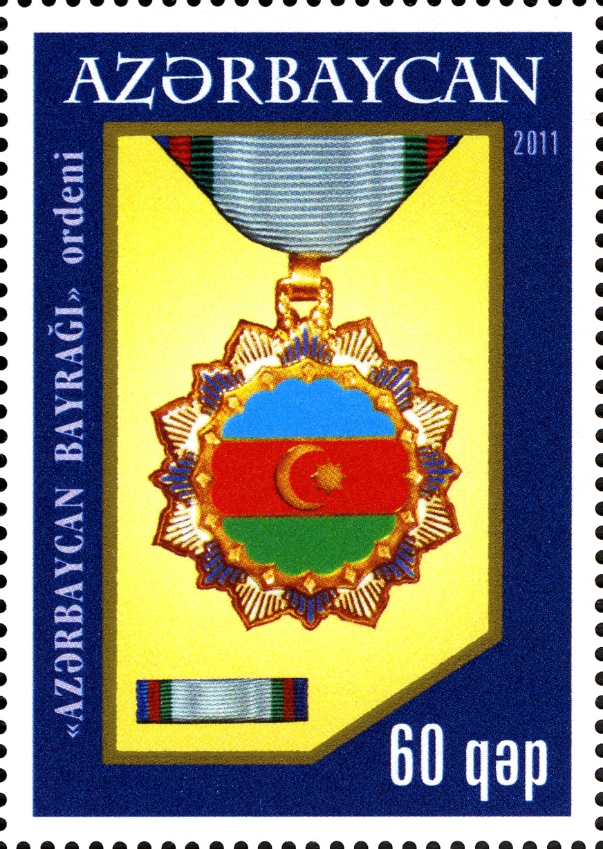 Azərbaycan Respublikasının Ordenləri.